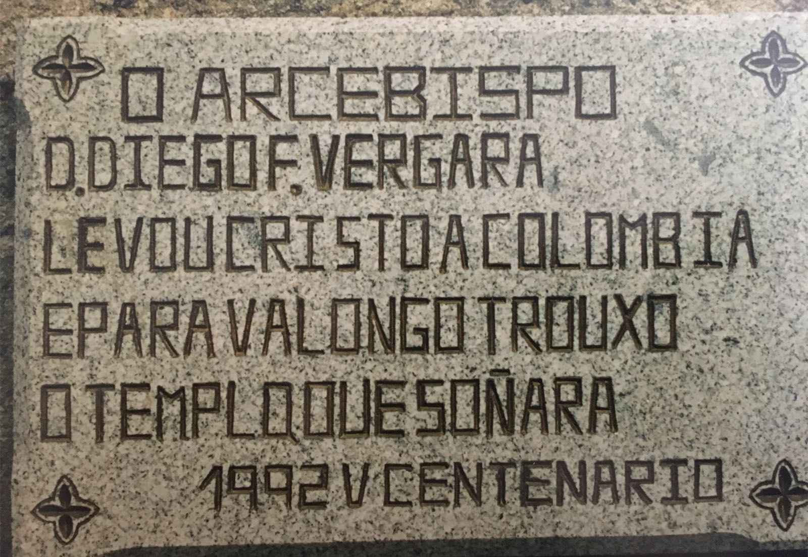 Agustín Fray Diego Fermín de Vergara